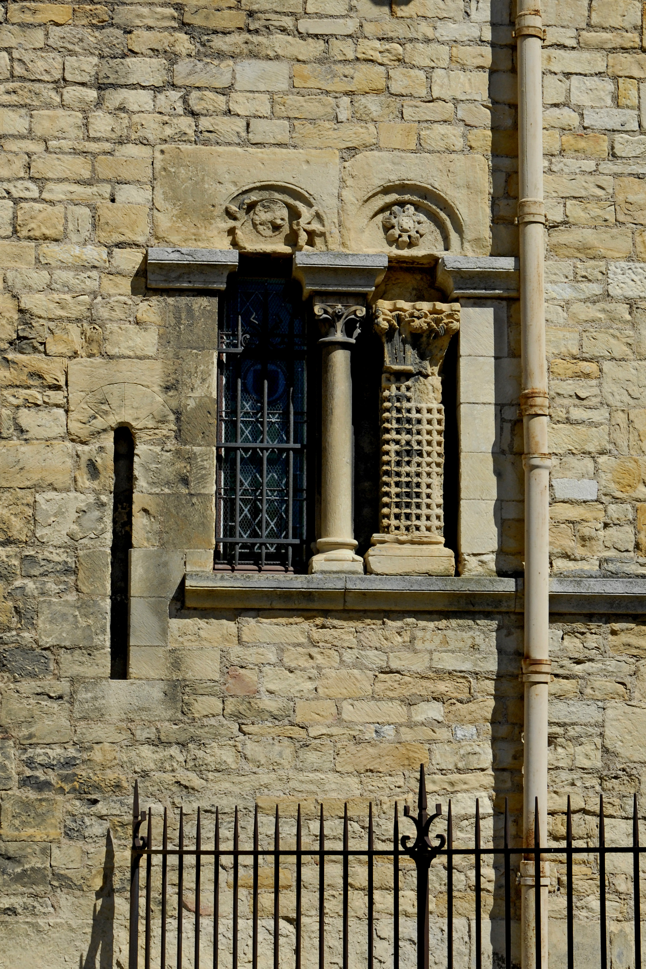 Kathedrale Nevers, Fenster im Anbau neben Westchor